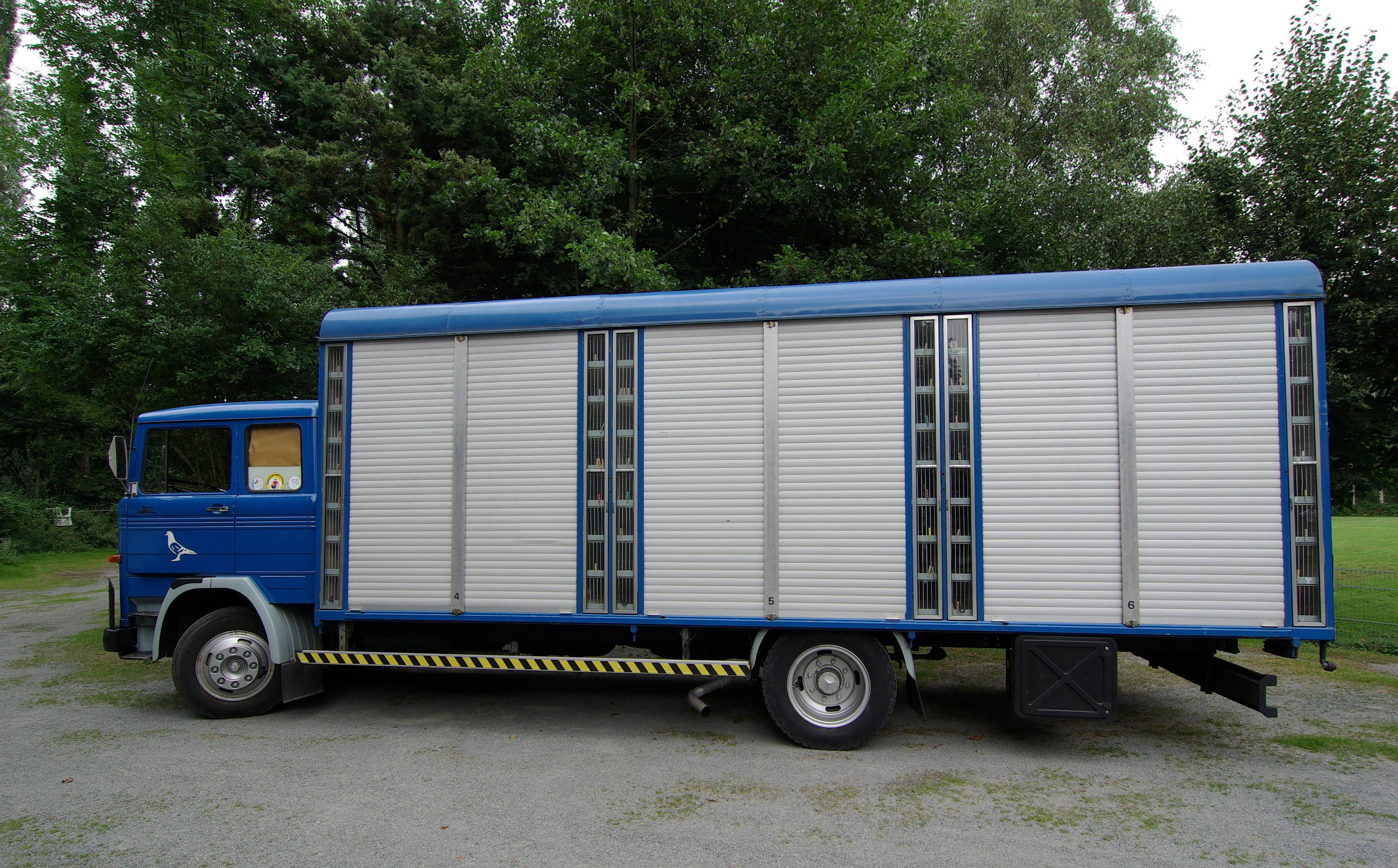 Brieftaubentransporter für Wettbewerbe. Mit freundlicher Genehmigung der reisevereinigung Bochum-Nord e.V.